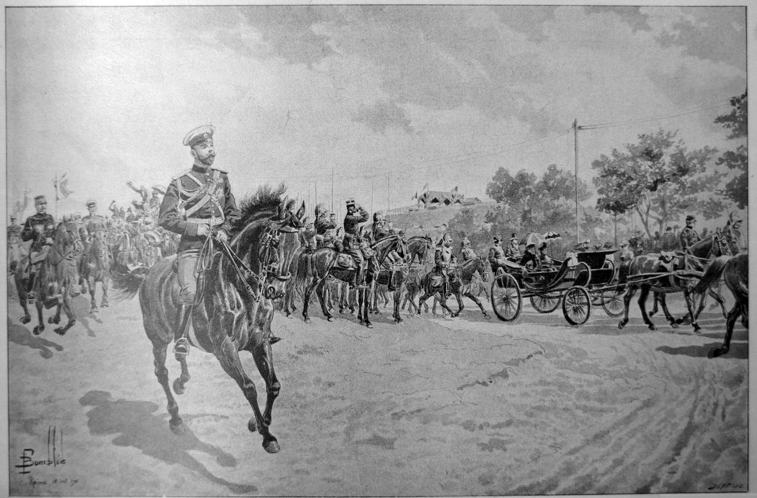 Le 19 septembre,l'arrivée_au_fort_de_Prosnes de Nicolas II .